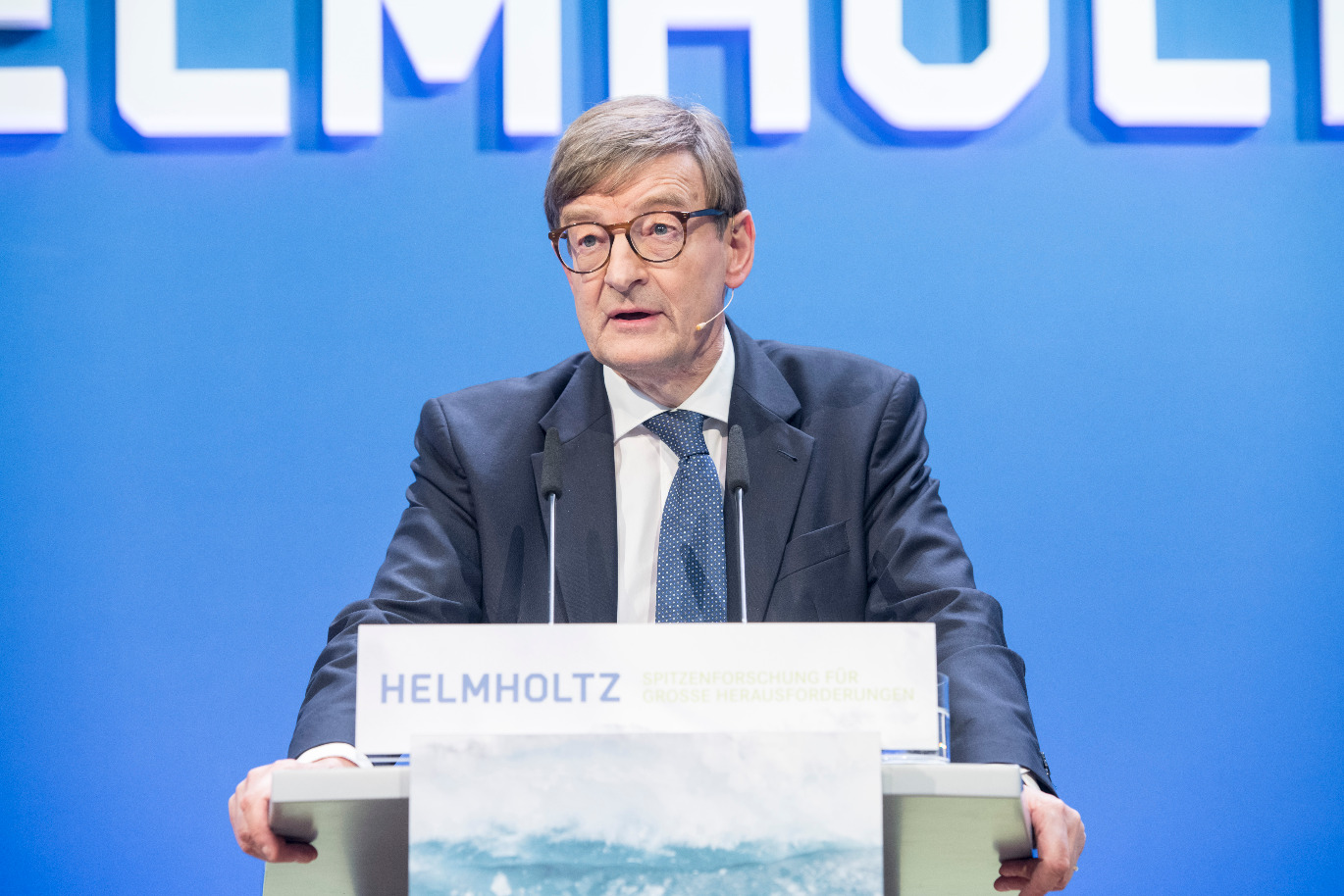 Helmholtz-Präsident Otmar D. Wiestler hält auf der Helmholtz-Jahrestagung 2019 eine Rede.